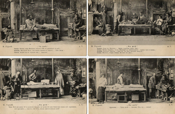 «На дне». Постановка МХТ, Действие I